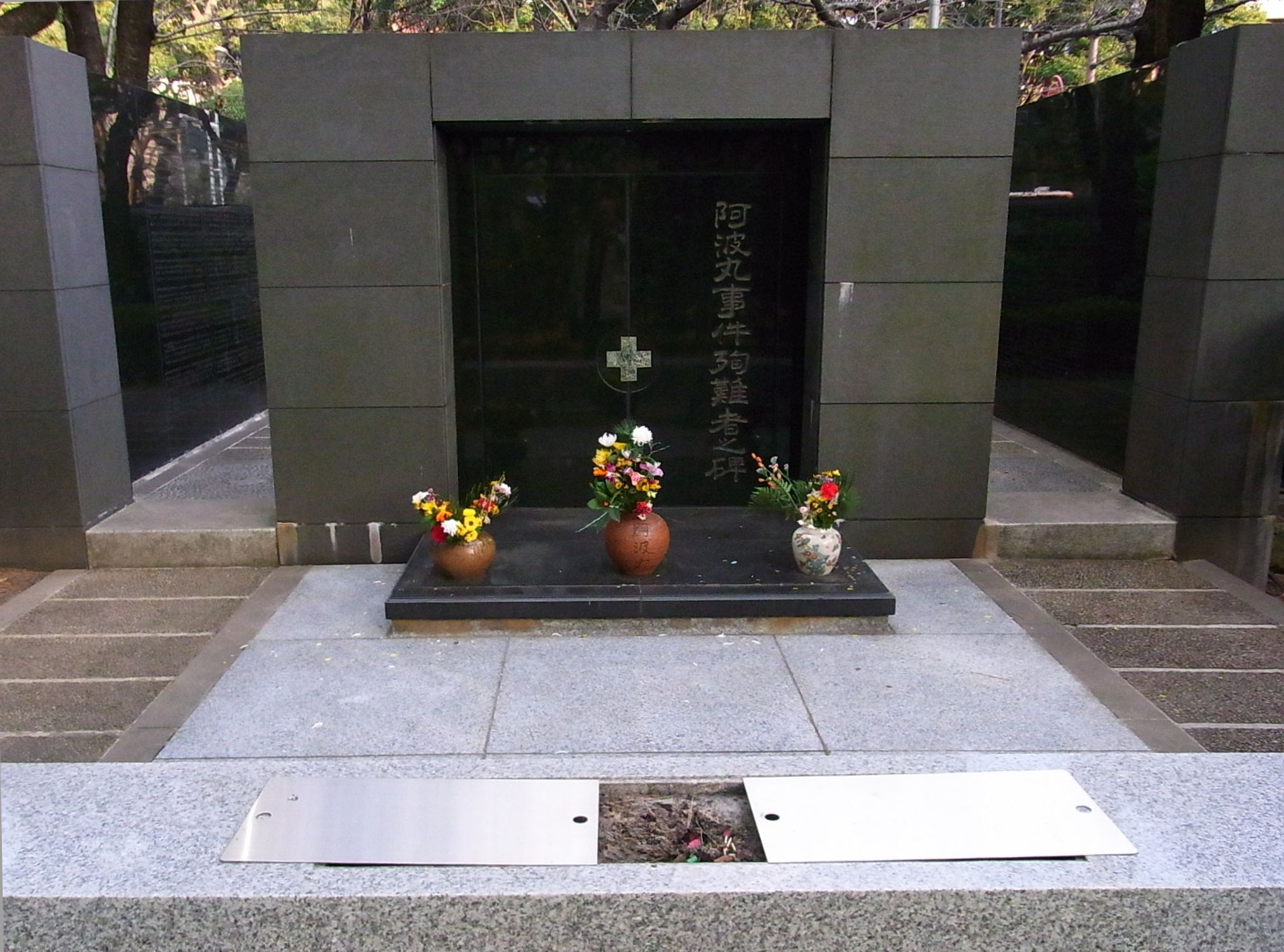 三縁山 増上寺